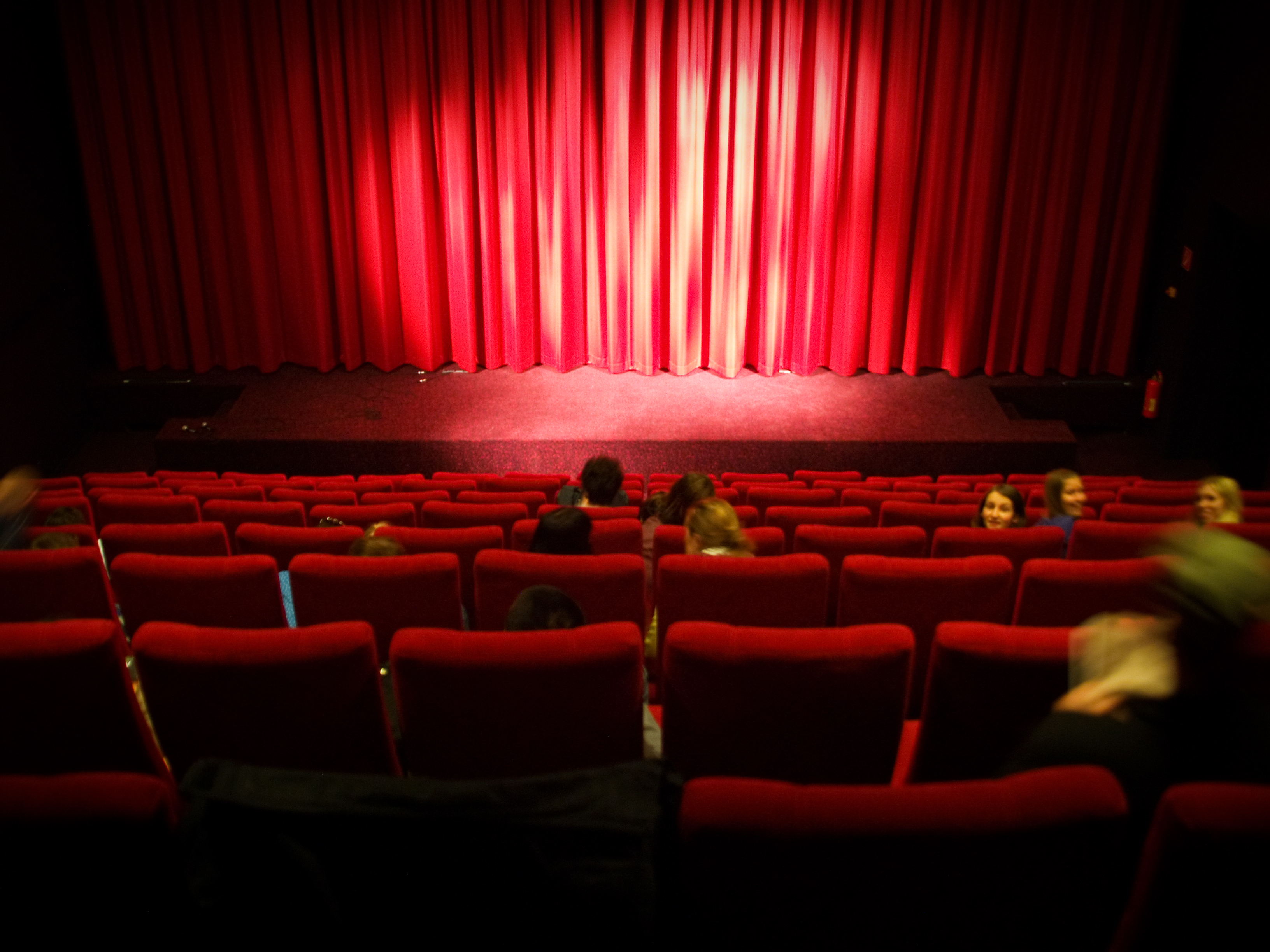 Moviemento & City Kino OK-Platz 1 & Graben 39 4020 Linz Member of